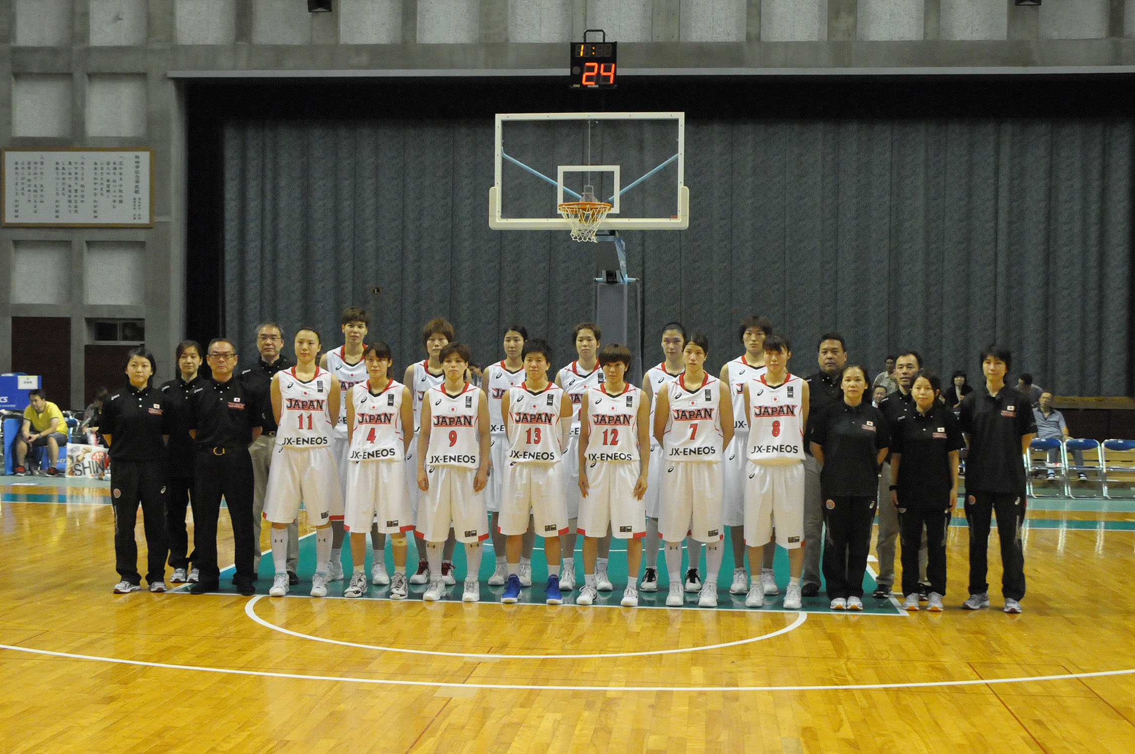 バスケットボール女子日本代表チーム（FIBA世界選手権出場）。秋田市立体育館で。